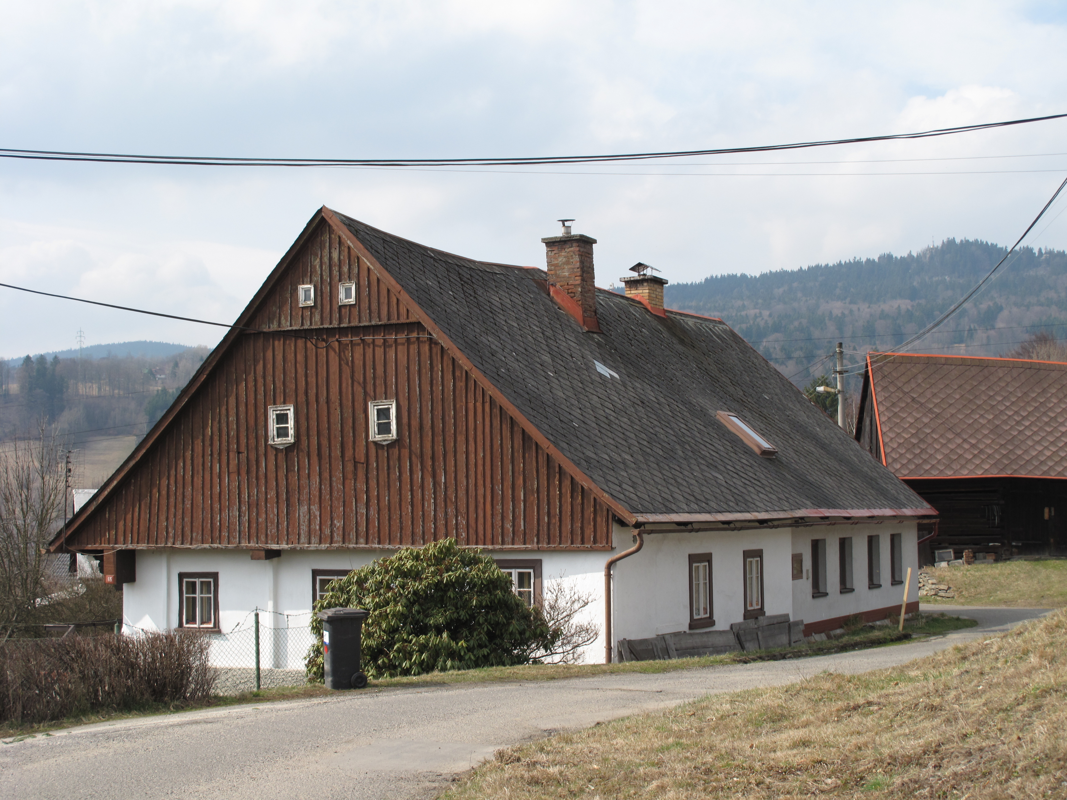 Chalupa v Bohdalovicích. Okres Jablonec nad Nisou, Česká republika.